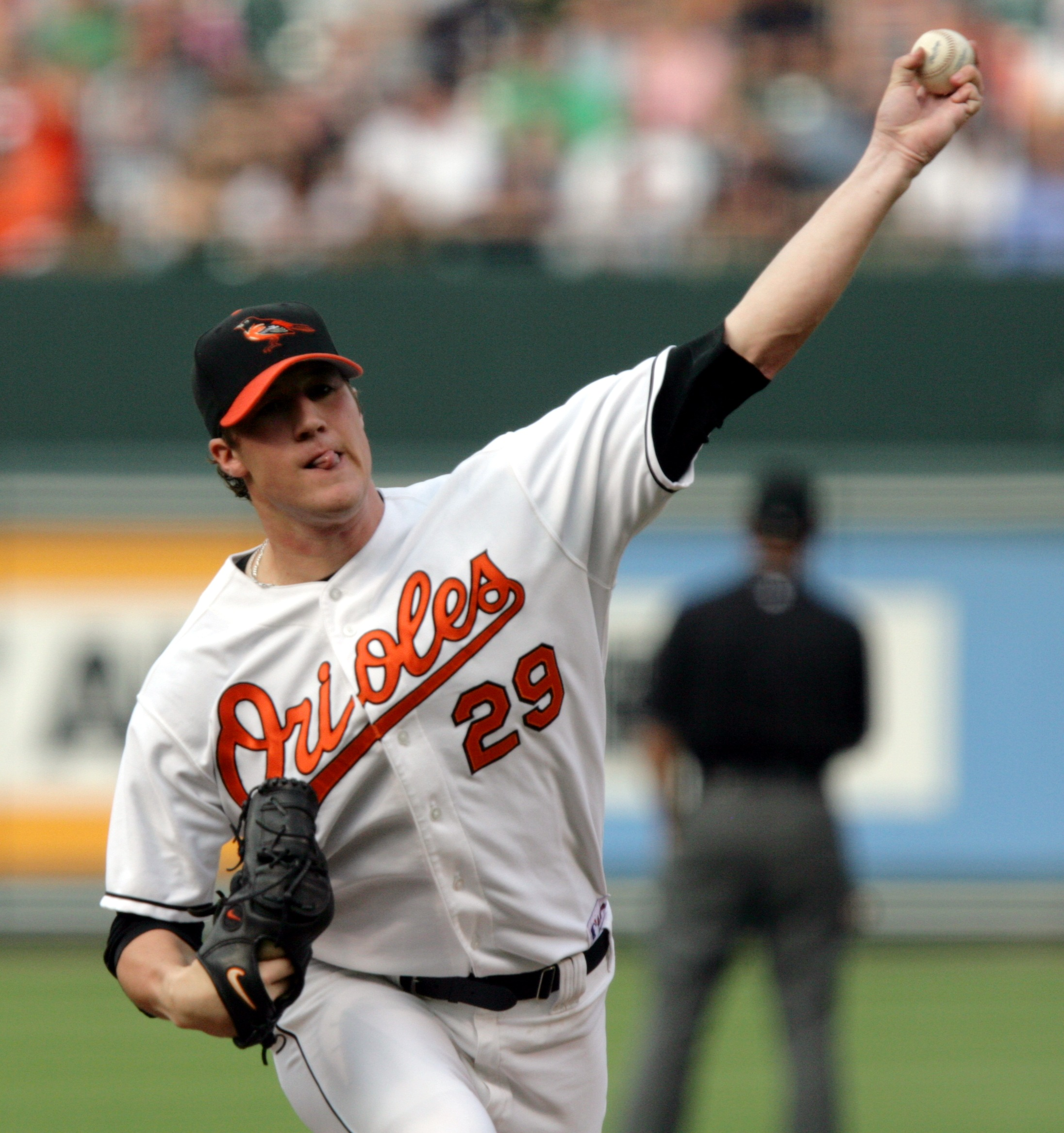 Adam Loewen